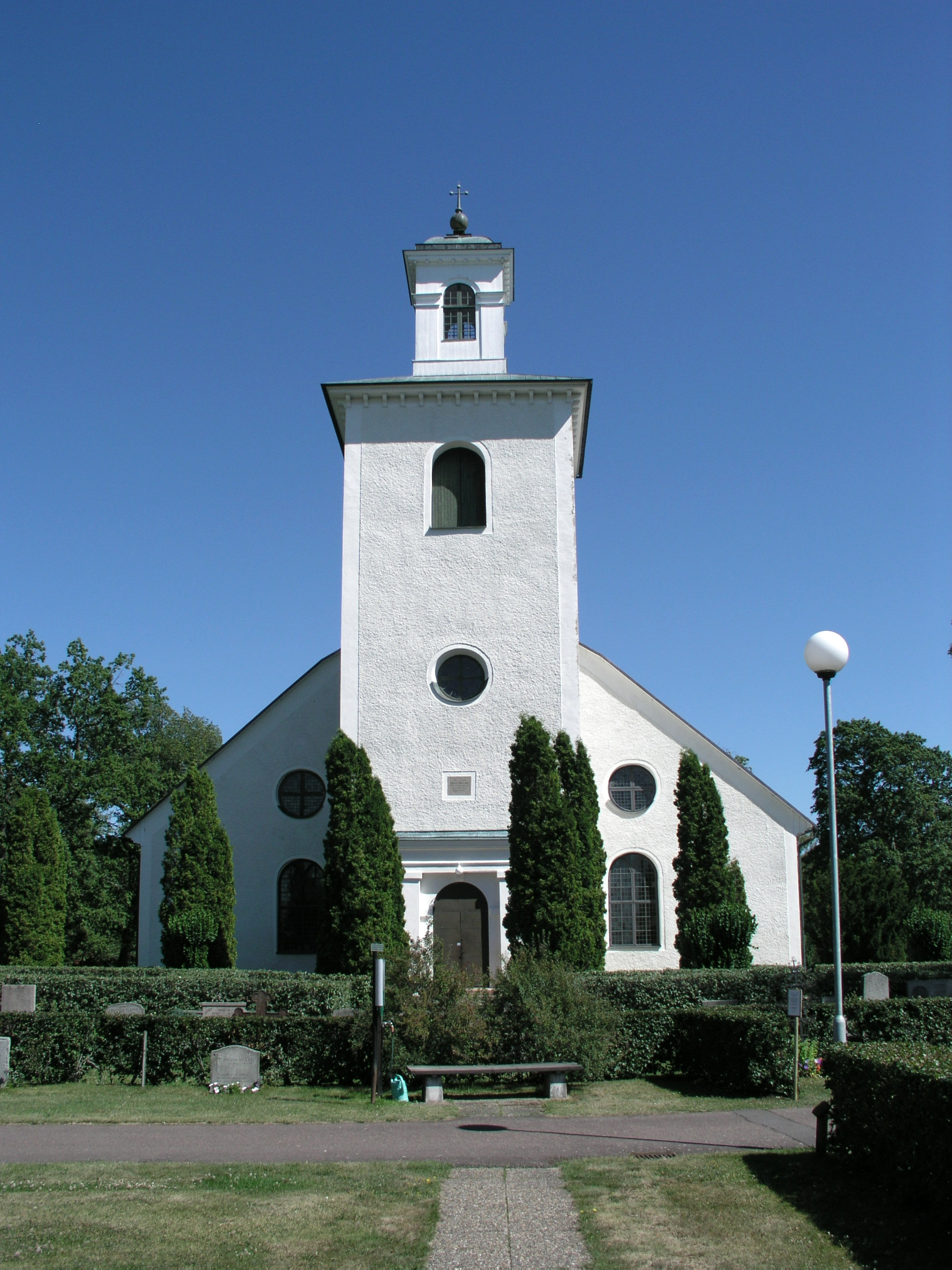 Väse kyrka, Diocese of Karlstad, Sweden.